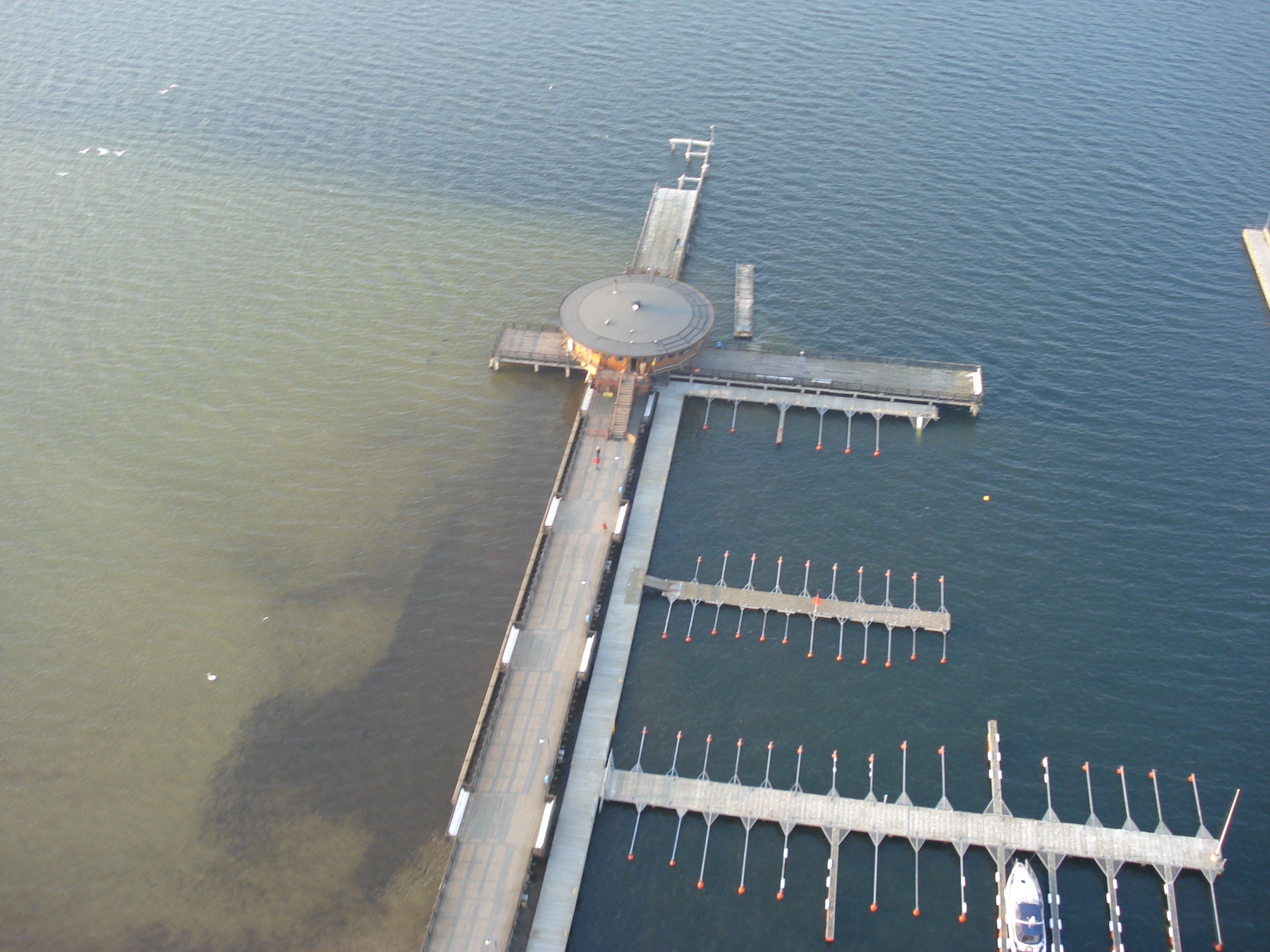 Przelot skrzydłem Oksywie-Puck